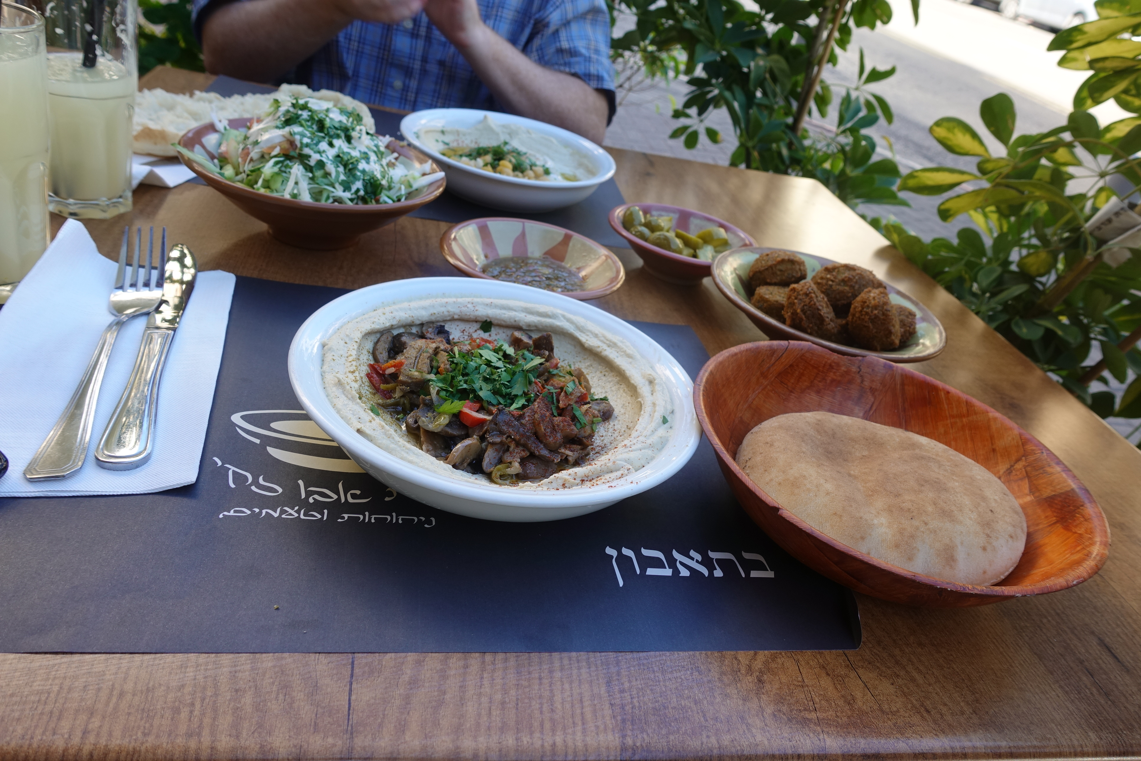 Plat de houmous au restaurant à Tel-Aviv accompagné de pickles et de pain pita